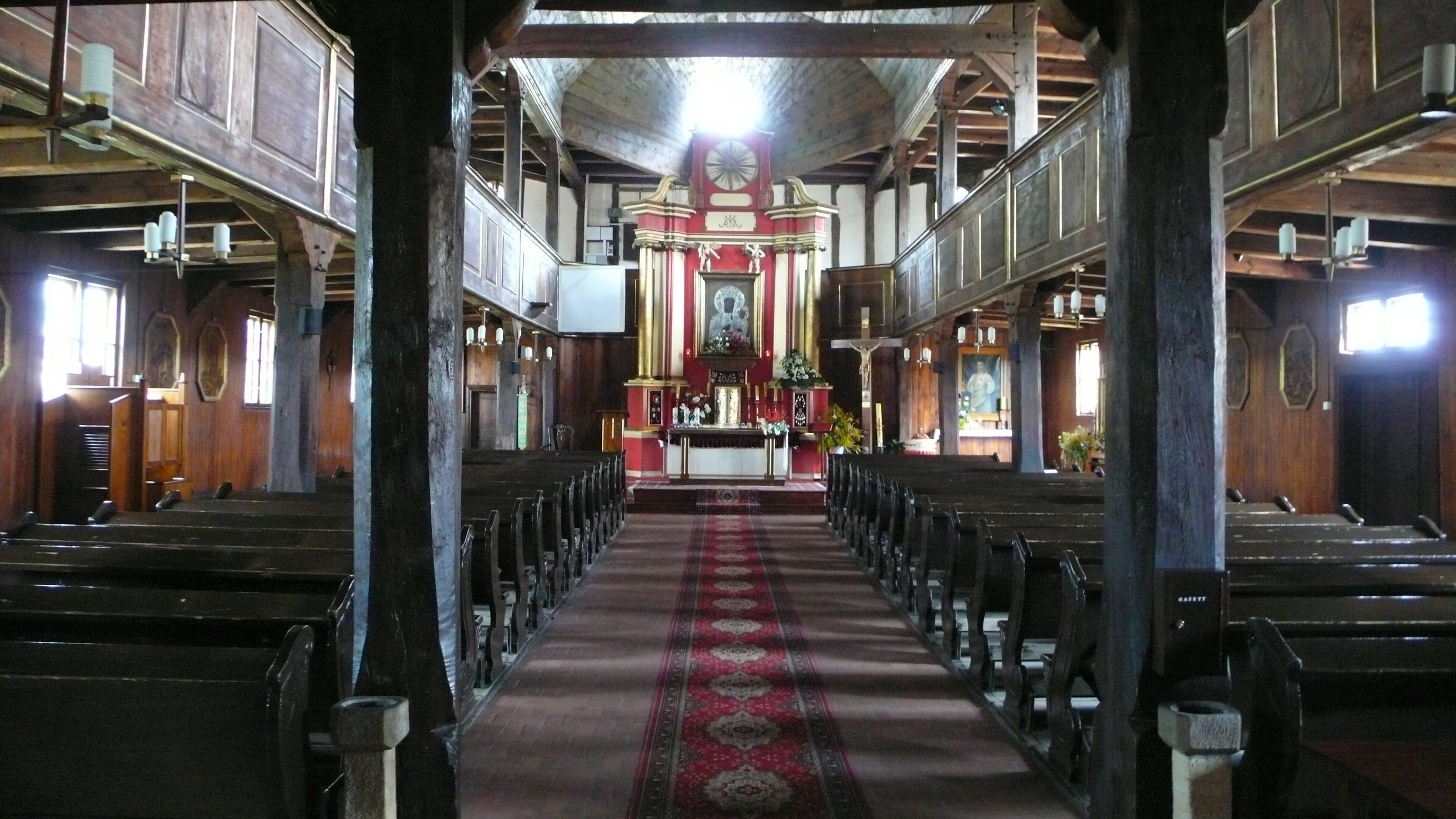 Kościół w Zaborowie fot. 4